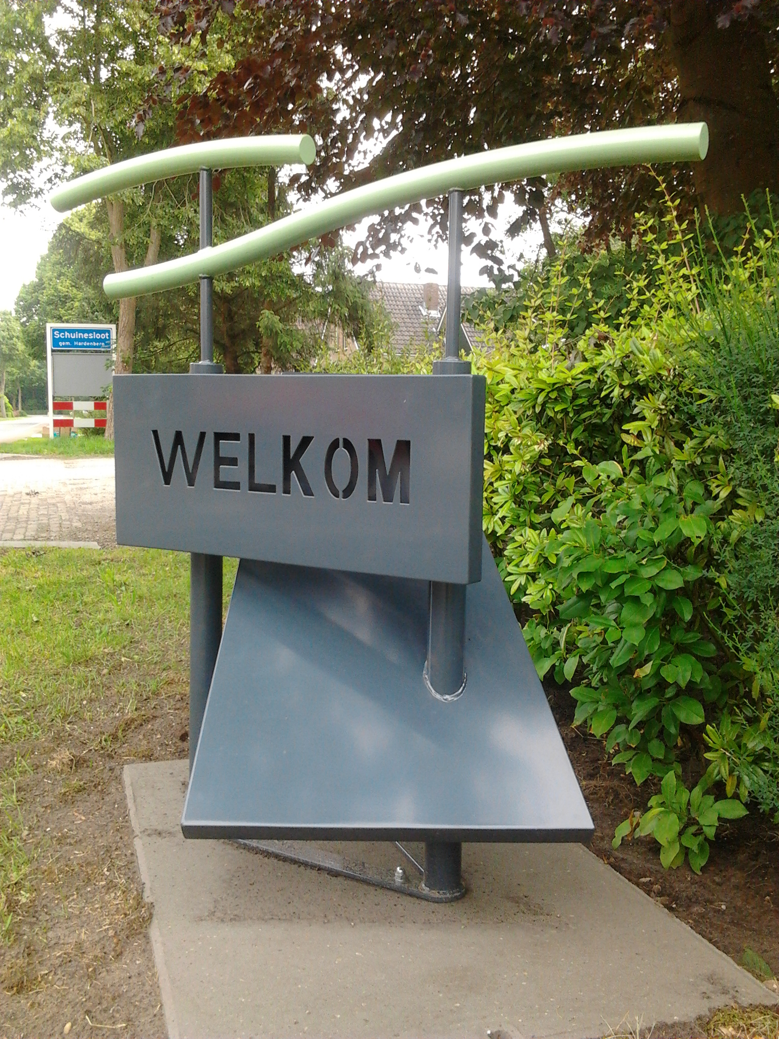 Kunstwerk nabij grens bebouwde kom Schuinesloot